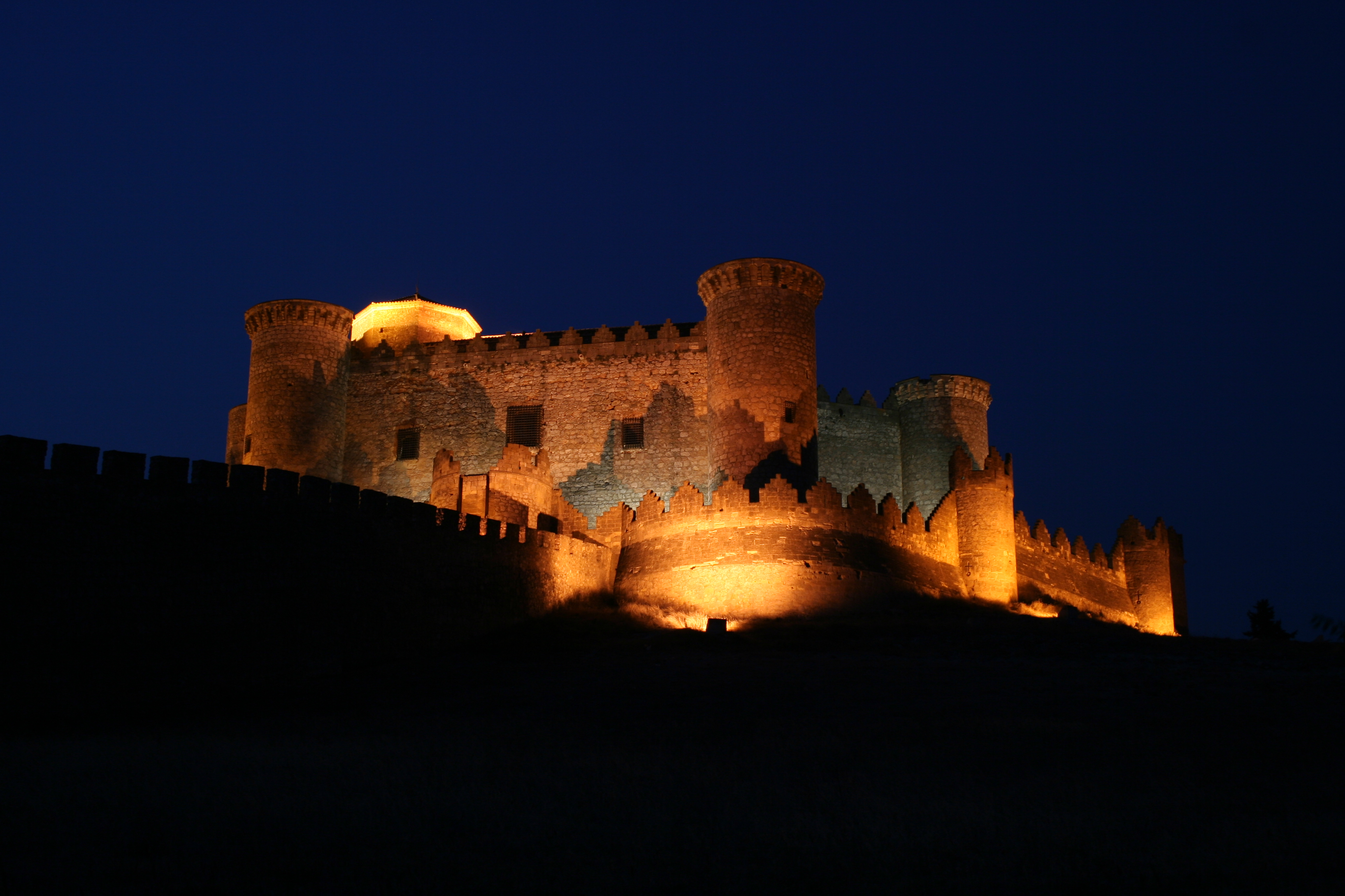 Vista nocturna del castillo de belmonte, Cuenca.